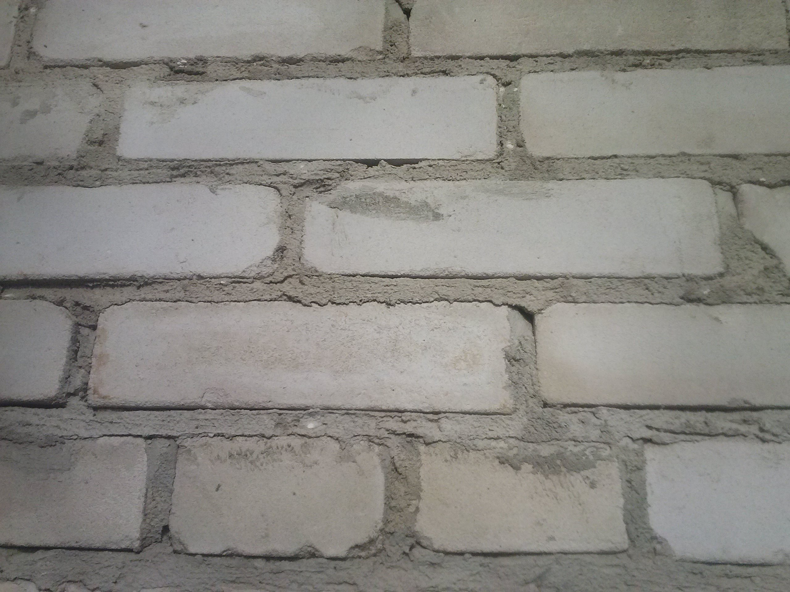 Ściana murowana z cegły silikatowej